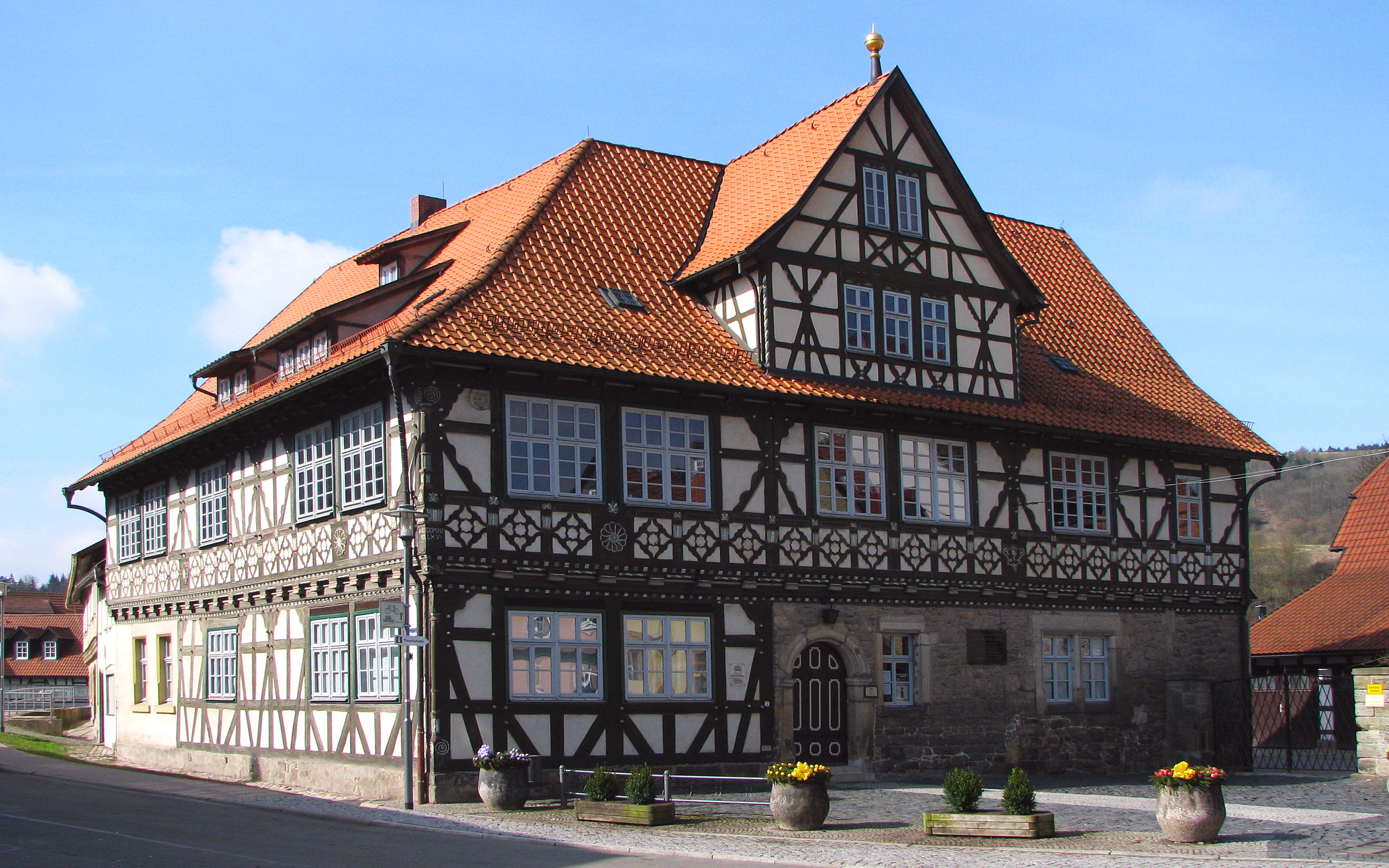 Themar in Thüringen: das Amtshaus von 1665 hennebergisch-fränkischer Fachwerkhaus-Stil saniert 1995 Foto Wolfgang Pehlemann IMG_2715